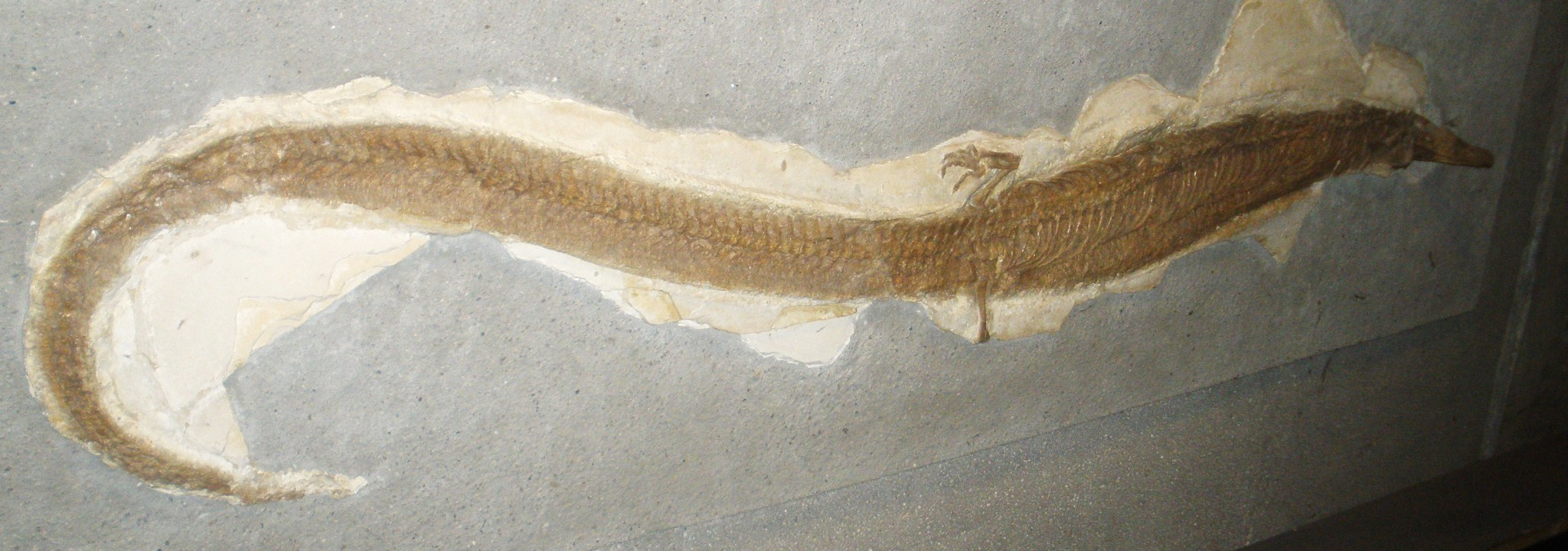 Fossil of Pleurosaurus, an extinct reptile- Took the photo at Senckenberg Museum of Frankfurt